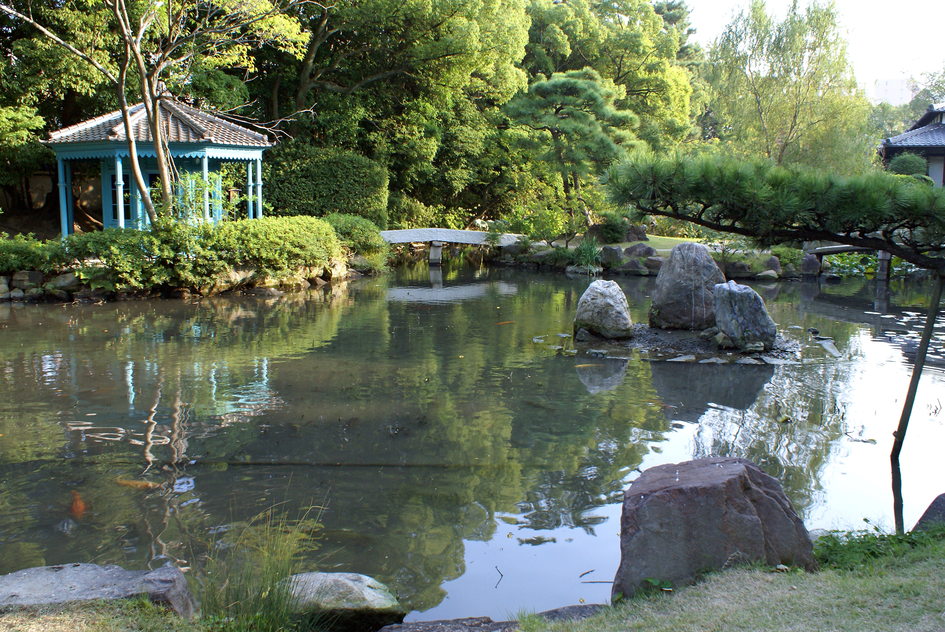 Shitennō-ji Honbo Garden in Osaka, Japan